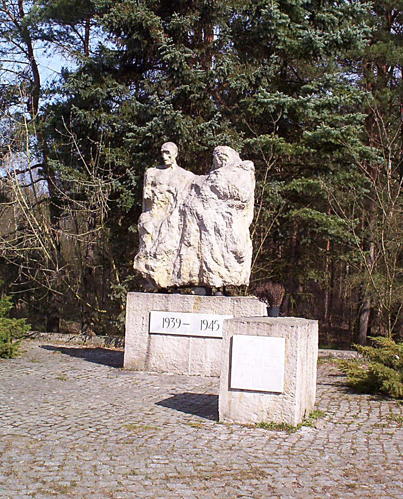 Trzeszczyn koło Szczecina - pomnik